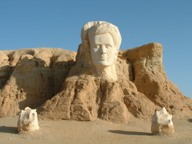 Photographie personnelle prise à Tozeur (Tunisie): portrait d'Abou el Kacem Chebbi au Belvédère